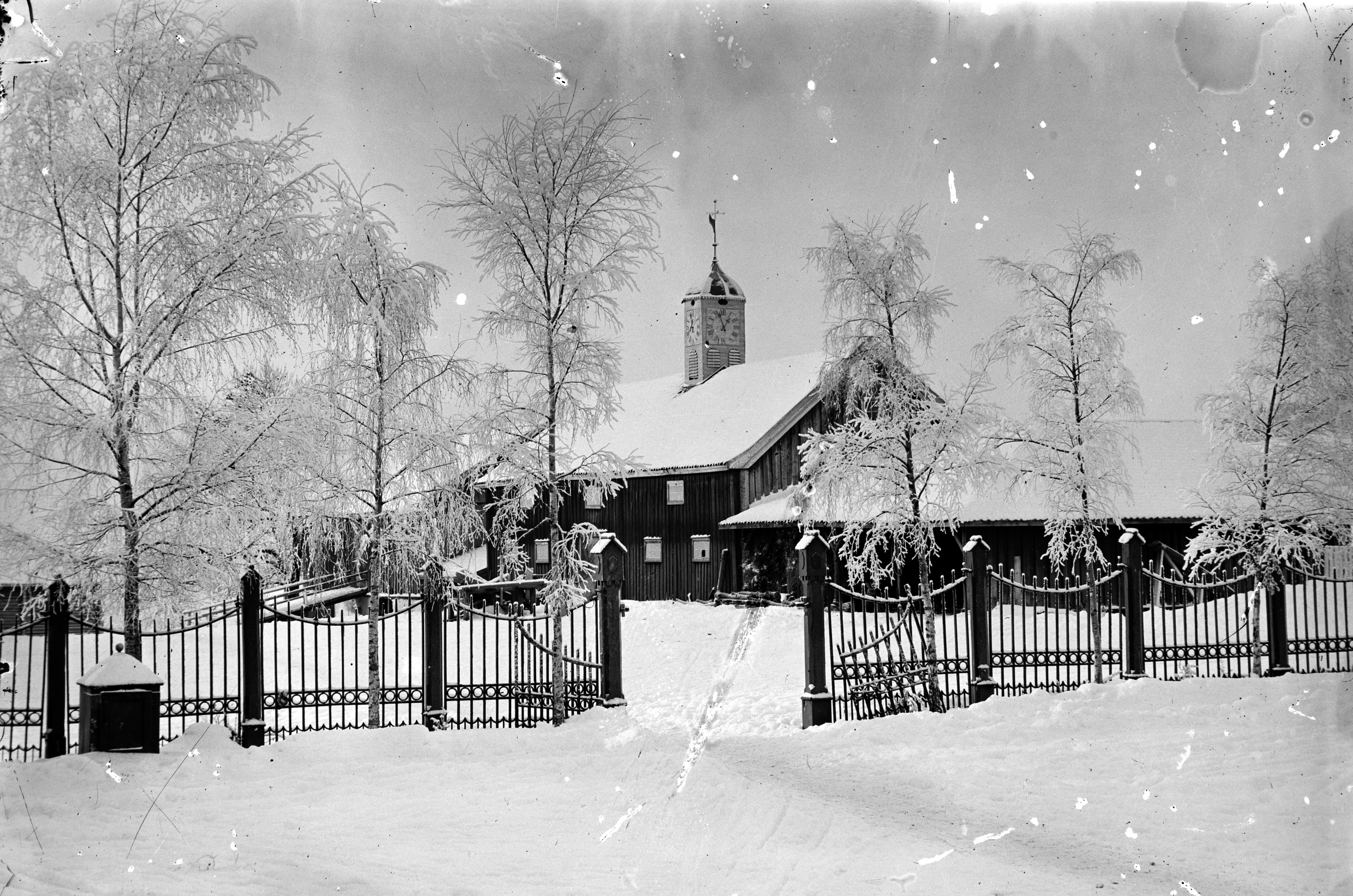 Hovinsholm er en storgård på Helgøya i Ringsaker.